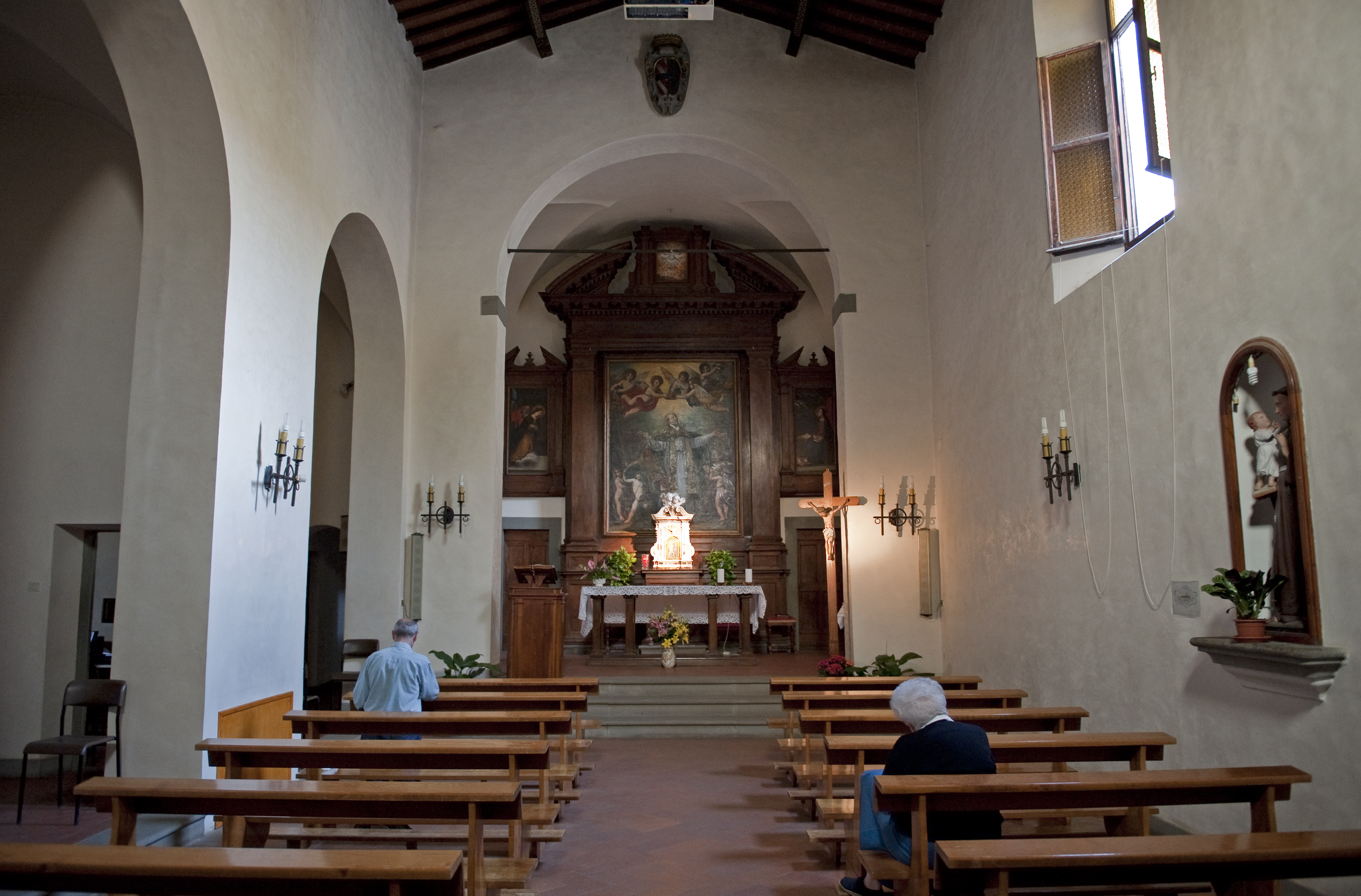 Convento dei Cappuccini, interno della chiesa - San Casciano in Val di pesa